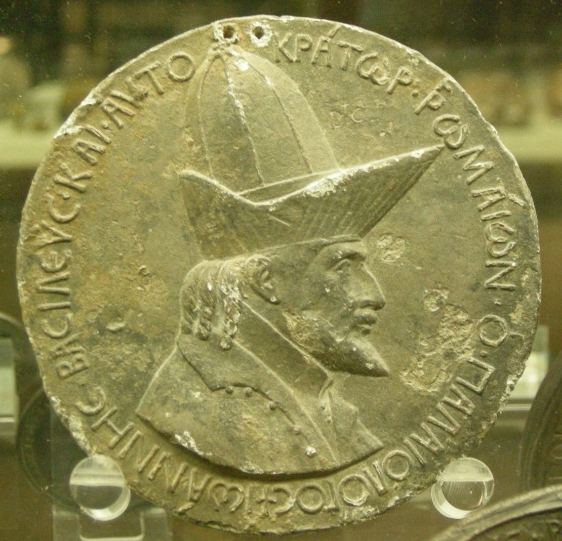 CdM, pisanello, medaglia di giovanni VIII paleologo r